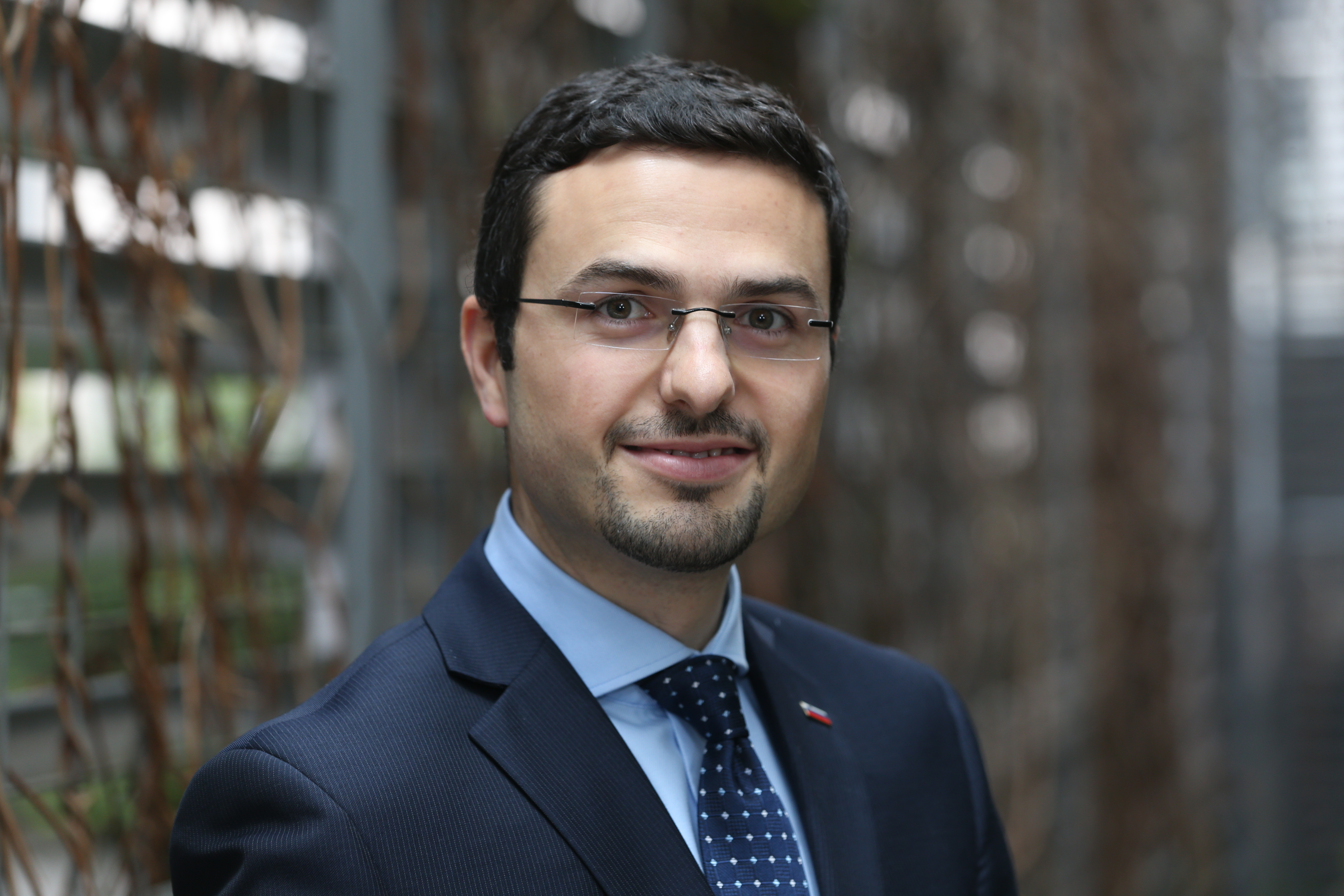 Slika poslanca NSi Mateja Tonina